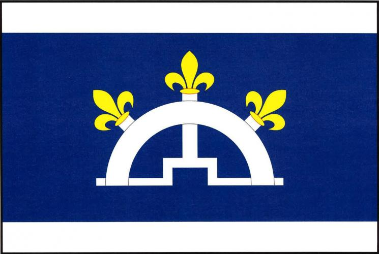 vlajka, Jindřichov, okres šumperk